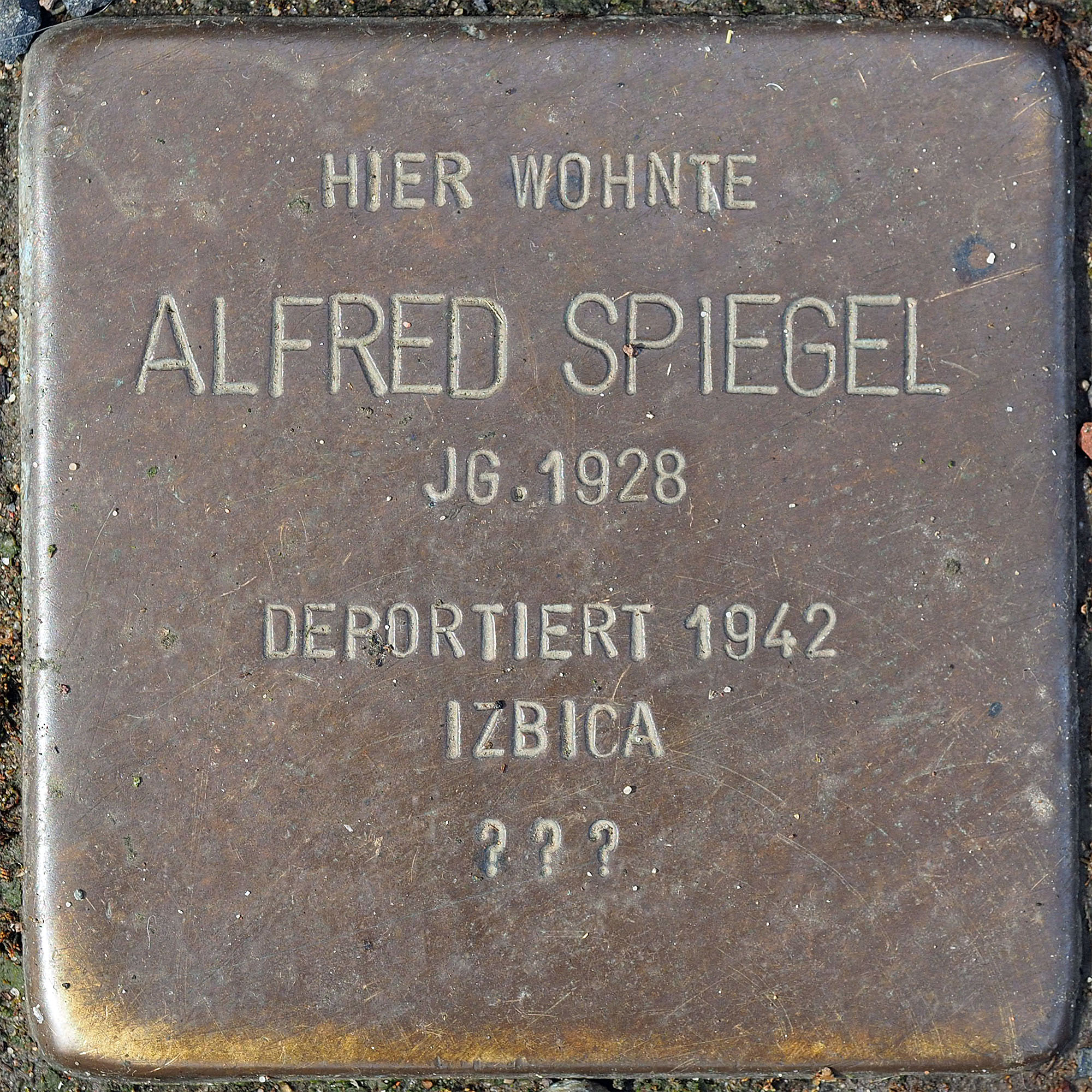 Stolpersteine MG: Spiegel, Alfred